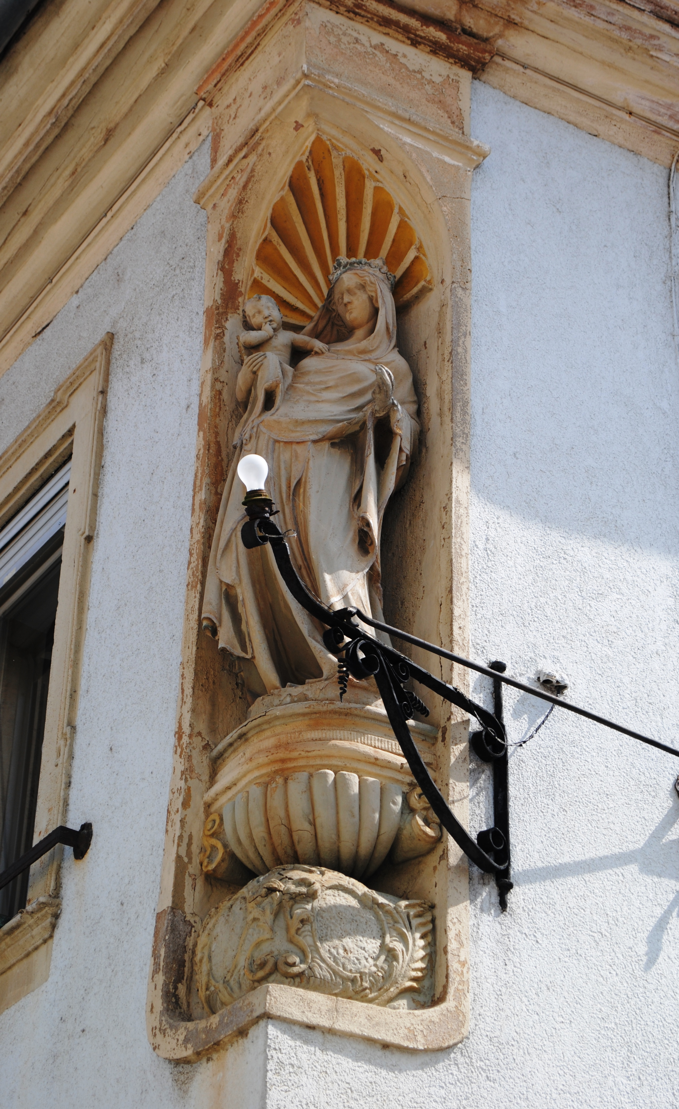 Hauptstraße 28, Gotische Madonnenfigur, Nordheim am Main